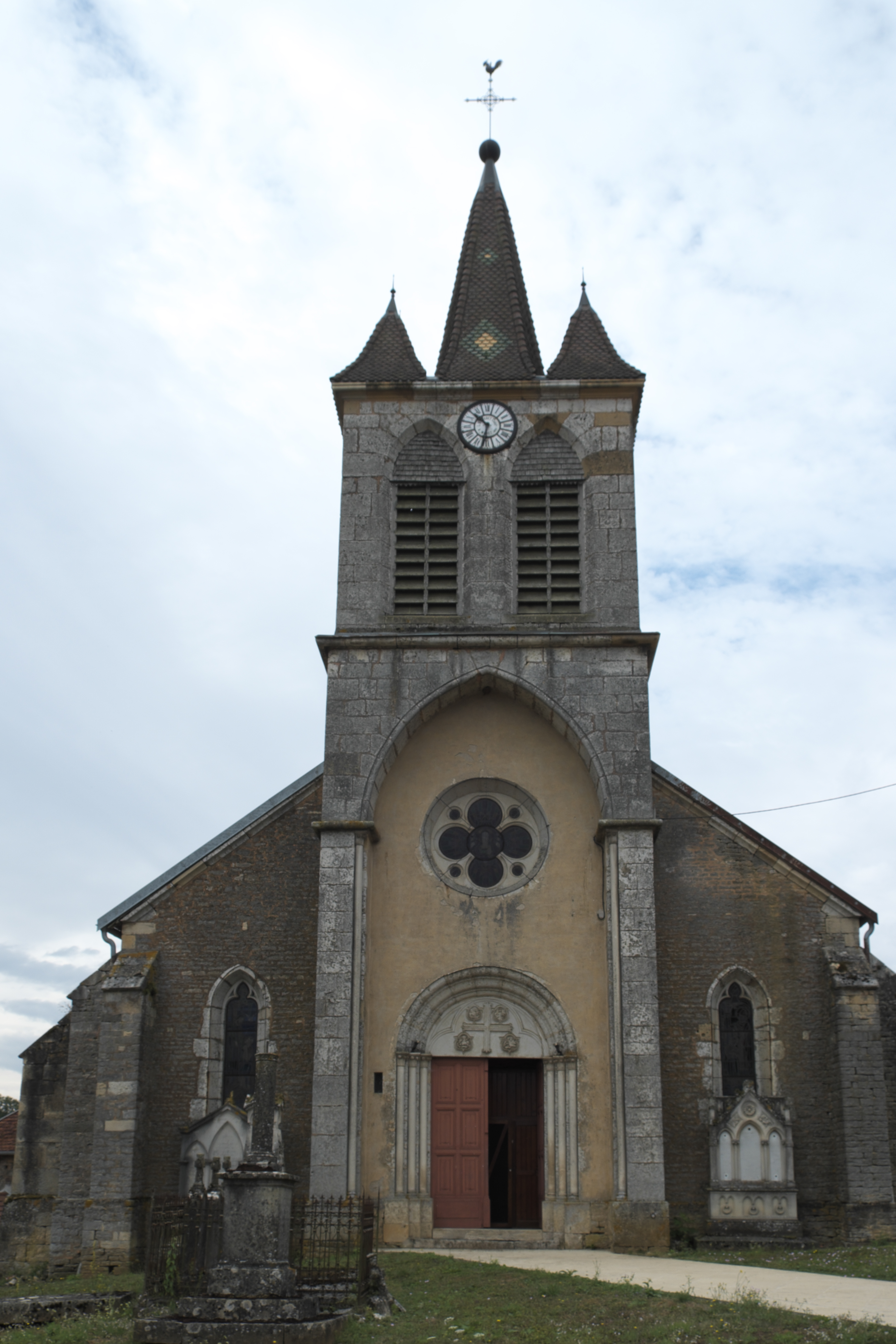 Katholische Pfarrkirche Saint-Mathieu in Farincourt im Département Haute-Marne (Champagne-Ardenne/Frankreich)